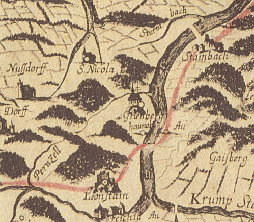 Ausschnitt aus der Archiducatus Austriae Superioris Geographica Descriptio (facta Anno 1667) Georg Matthäus Vischers. Bildmitte: Grienberg (Obergrünburg). Darüber: Nussdorff (Nußdorf) und Stainbach (Steinbach). Darunter: Leonstain (Burgruine Leonstein) und am unteren Rand Feichta (Schloss Leonstein). Rechts davon mündet die Krumme Steyrling in die Steyr.